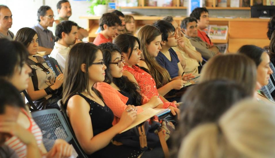 Foto de Capacitación de Equipo Recrea 2014